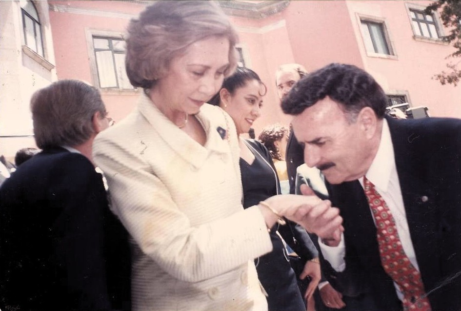 Fernando Muñoz Altea y la Reina Sofía